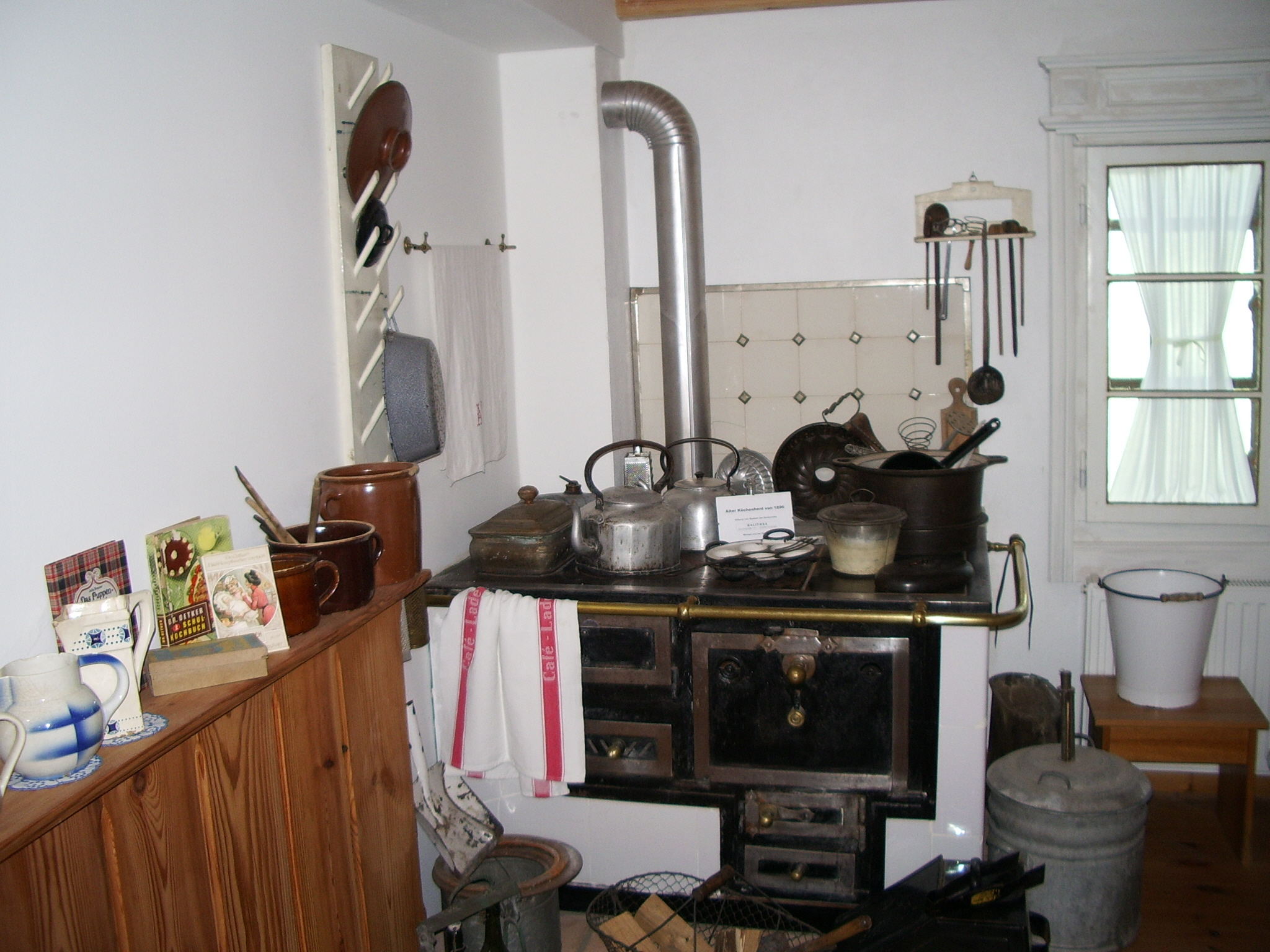 Kücheneinrichtung mit alten Küchenherd aus dem Jahr 1896 mit Kochgeschirr im Stadt und Heimatgeschichtliches Museum Uetersen.